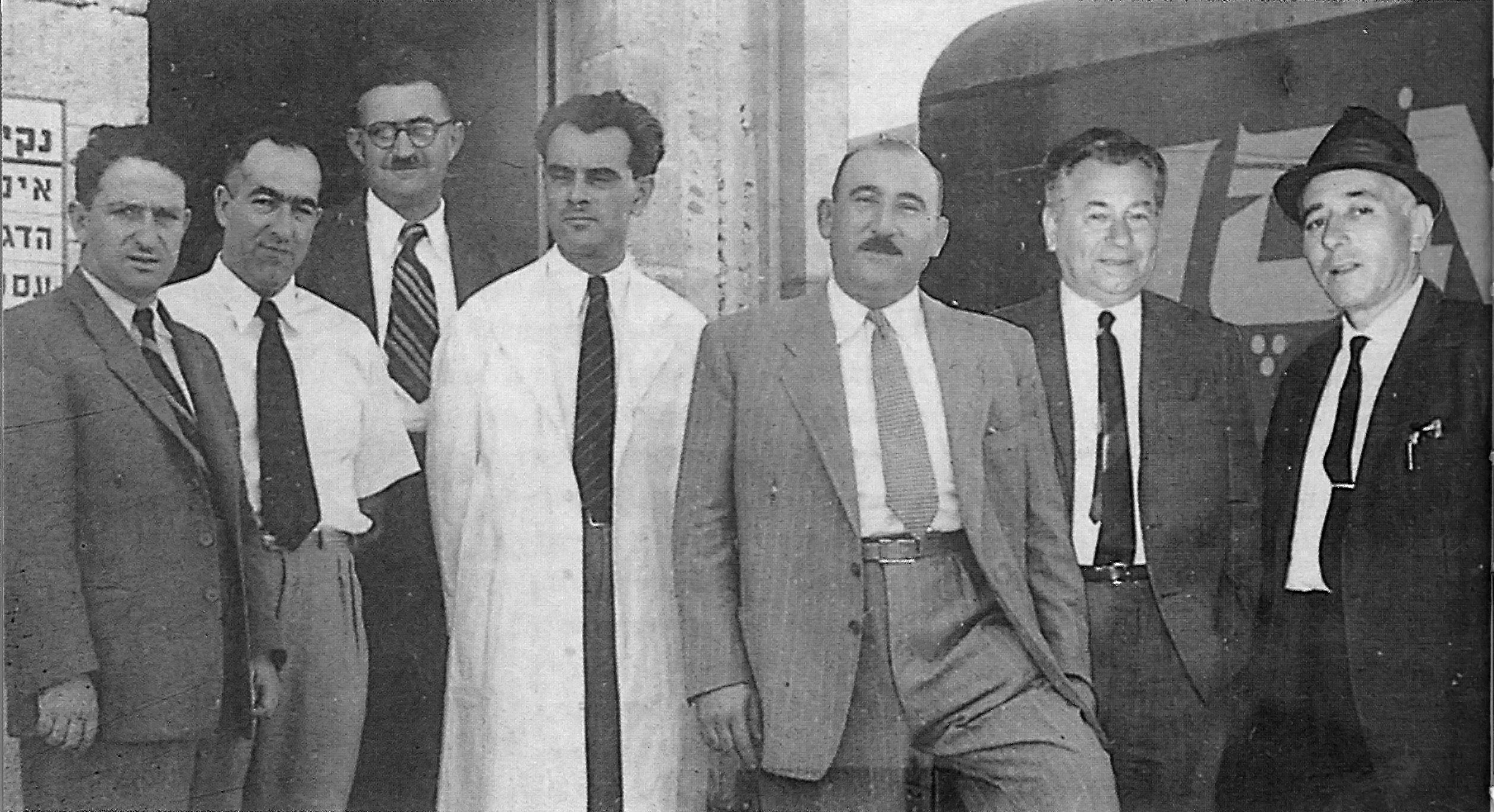 פוטומונטאז' של מייסדי אסם